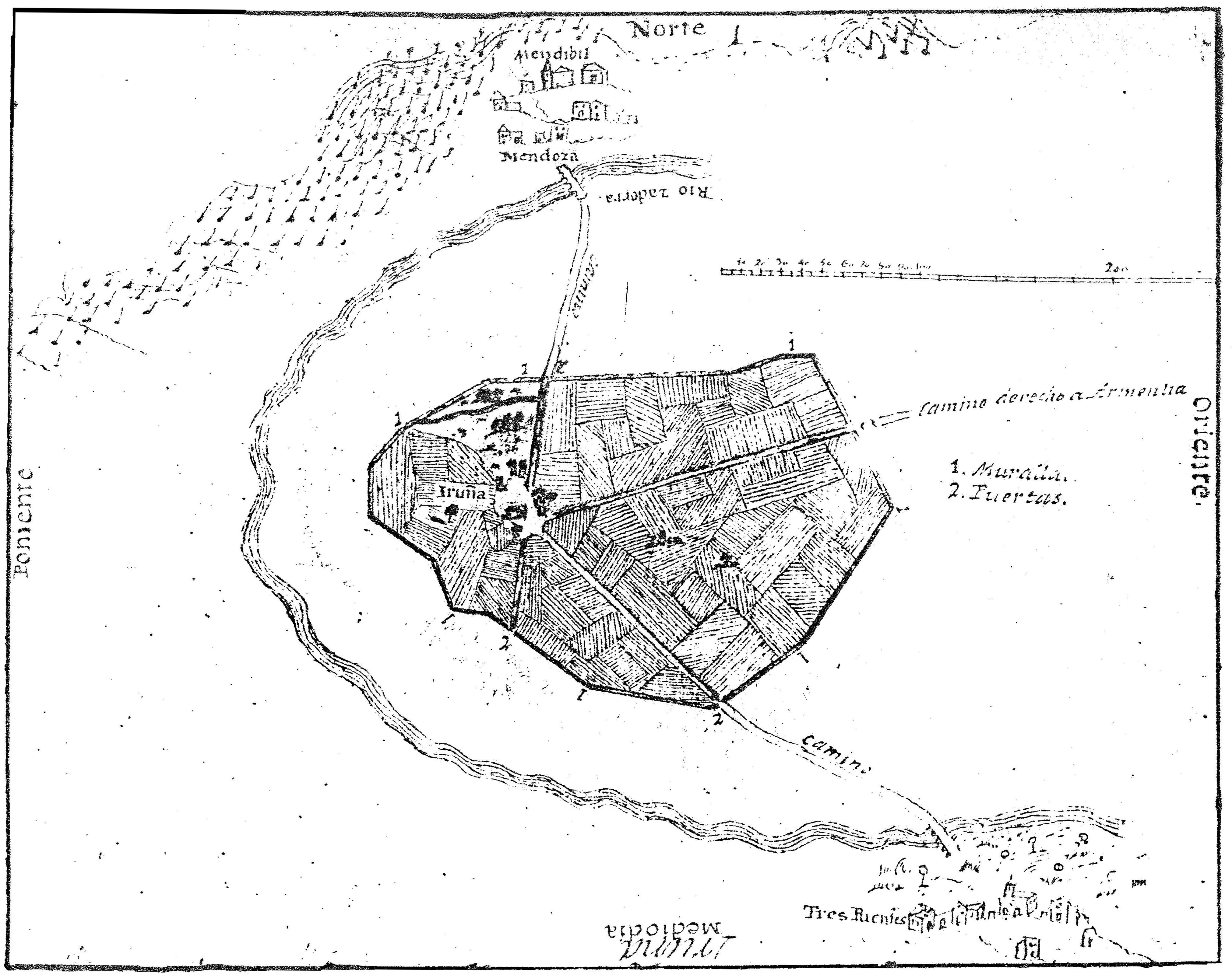 Lorenzo Prestamerok egindako Iruña-Beleiako planoa.